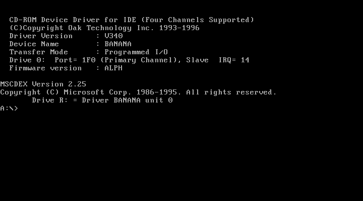 Zrzut ekranu DOS-a uruchomionego z dyskietki startowej Windows 98